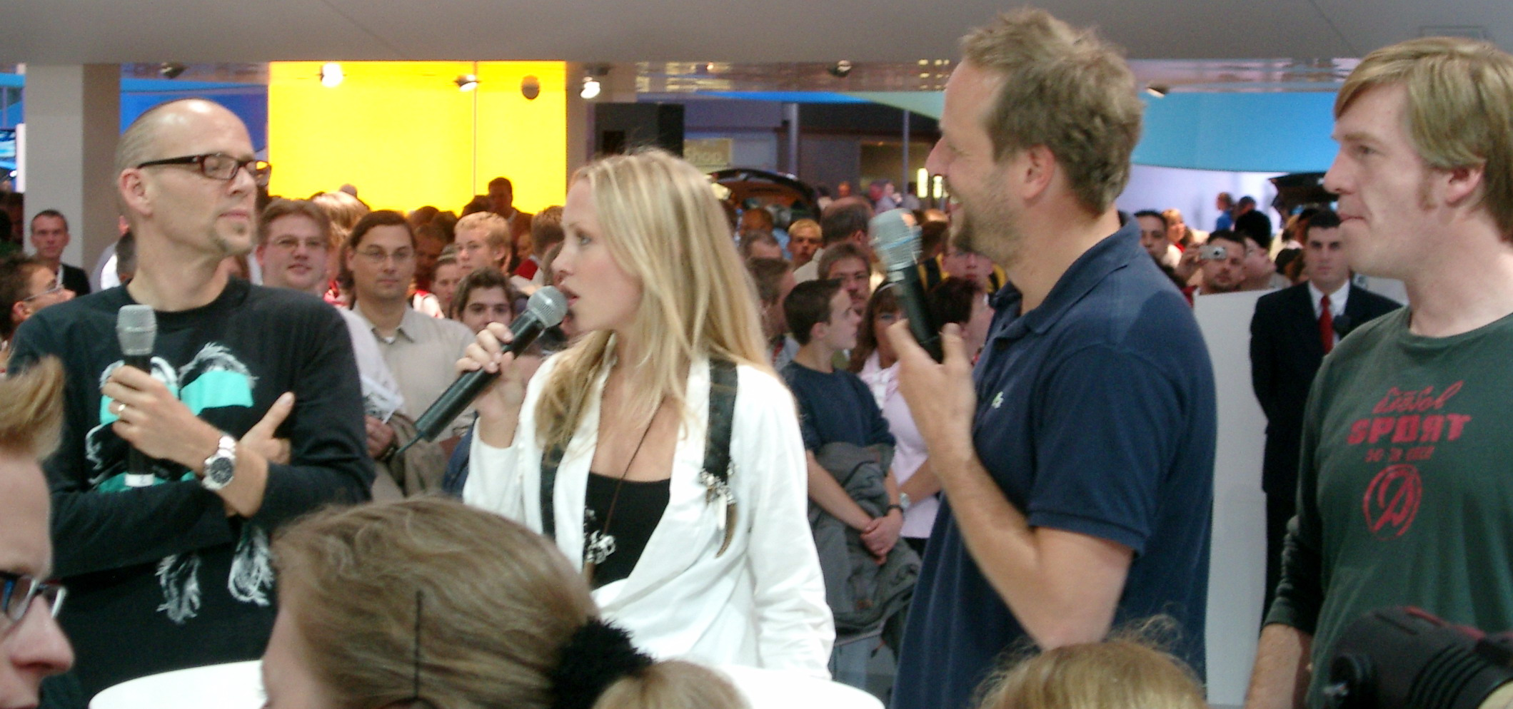 Die Fantastischen Vier: Thomas D., Moderatorin, Smudo und And.Ypsilon